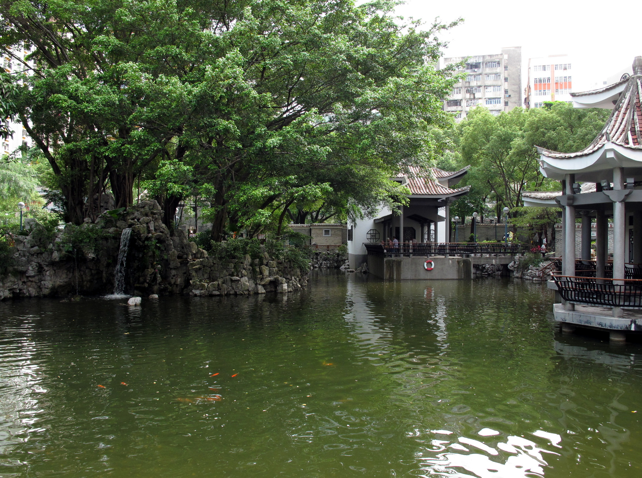 Tak Wah Park in Tsuen Wan